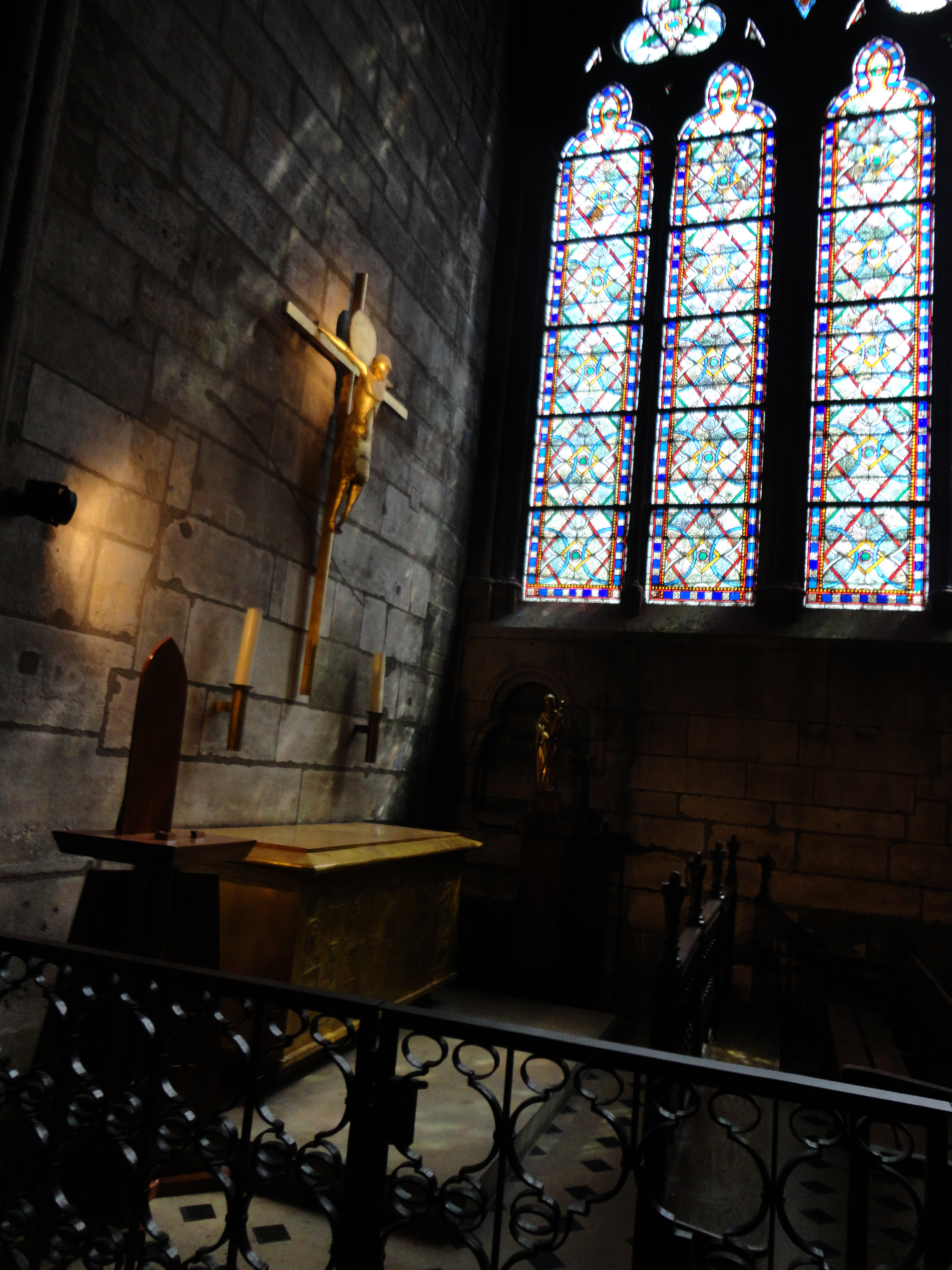 Cathédrale Notre-Dame de Paris